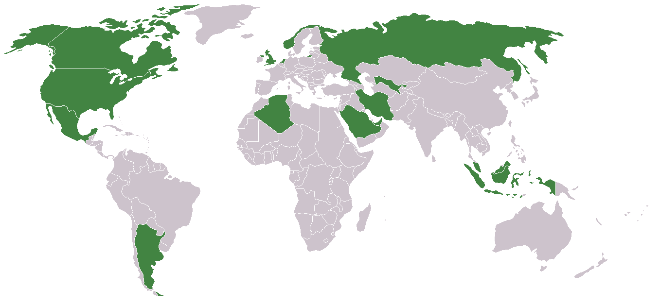 Karte der Staaten mit der weltweit größten Erdgasförderung GNU FDL St. Krekeler